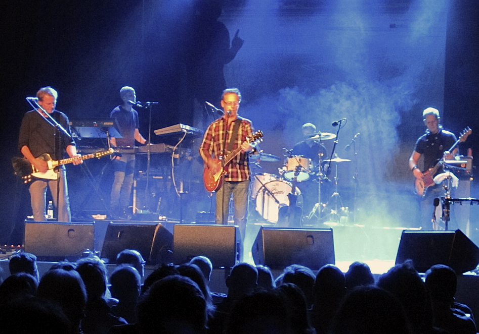 Freda' med gästartister live i Borås 2010.